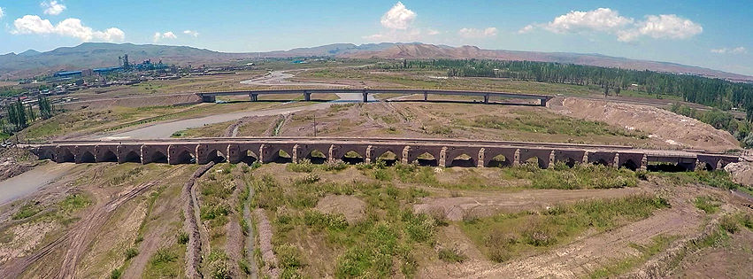 تصویر هوایی از پل شهرچای میانه - تهیه شده توسط حسین پوربهرامی